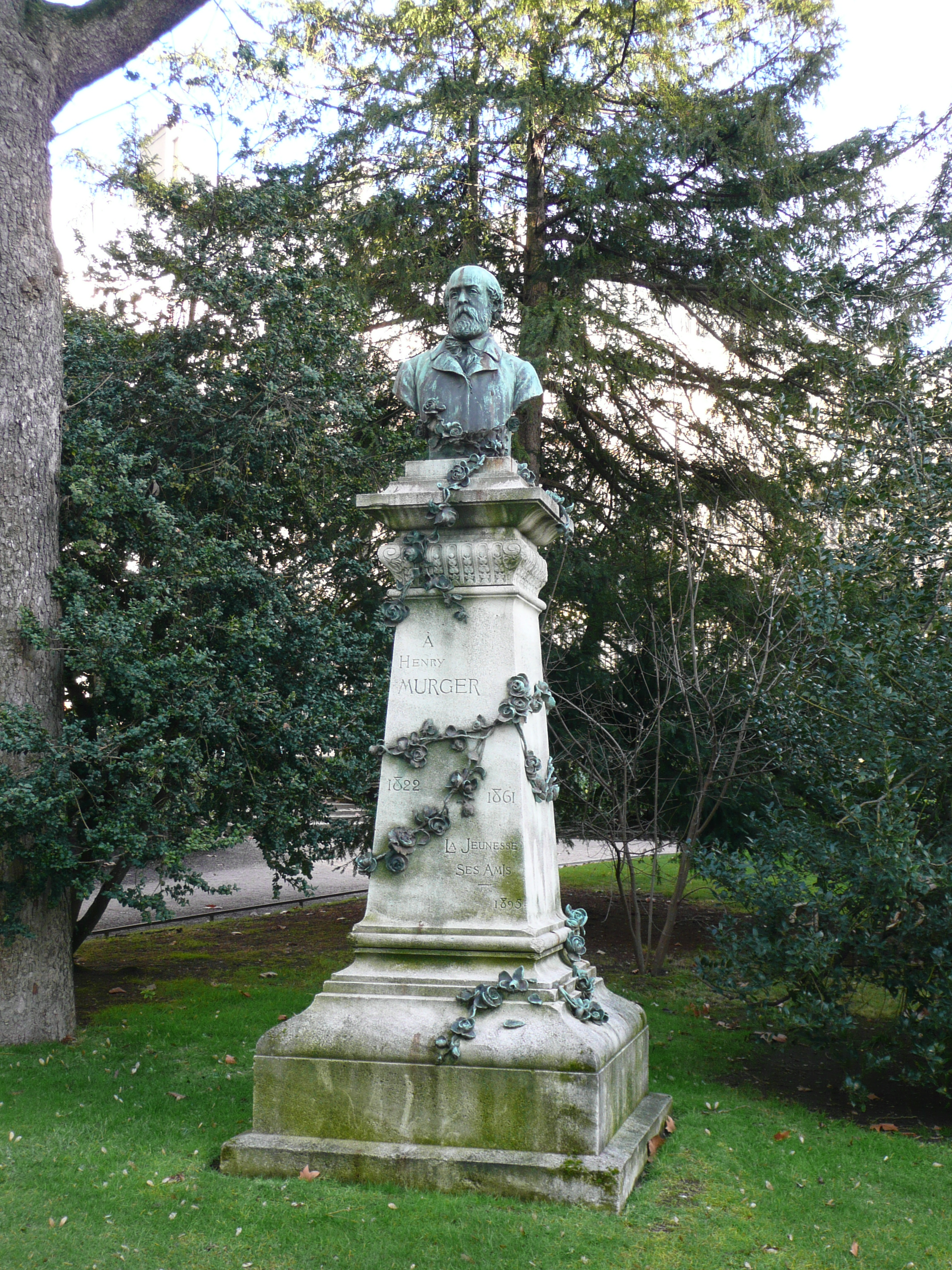 Buste d'Henry Murger situé dans le Jardin du Luxembourg